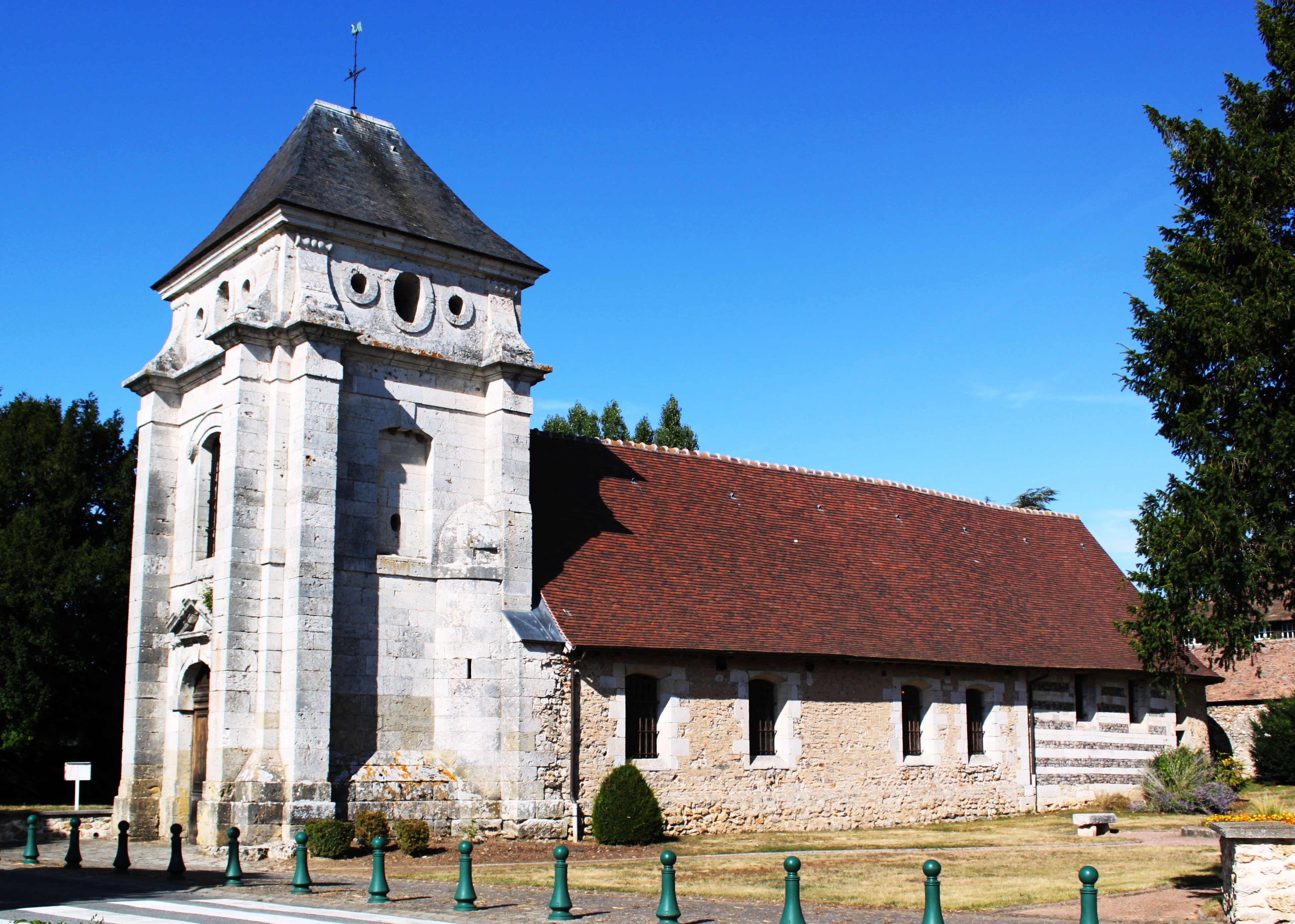 L'Église Saint-André, à Authouillet, Autheuil-Authouillet, Eure